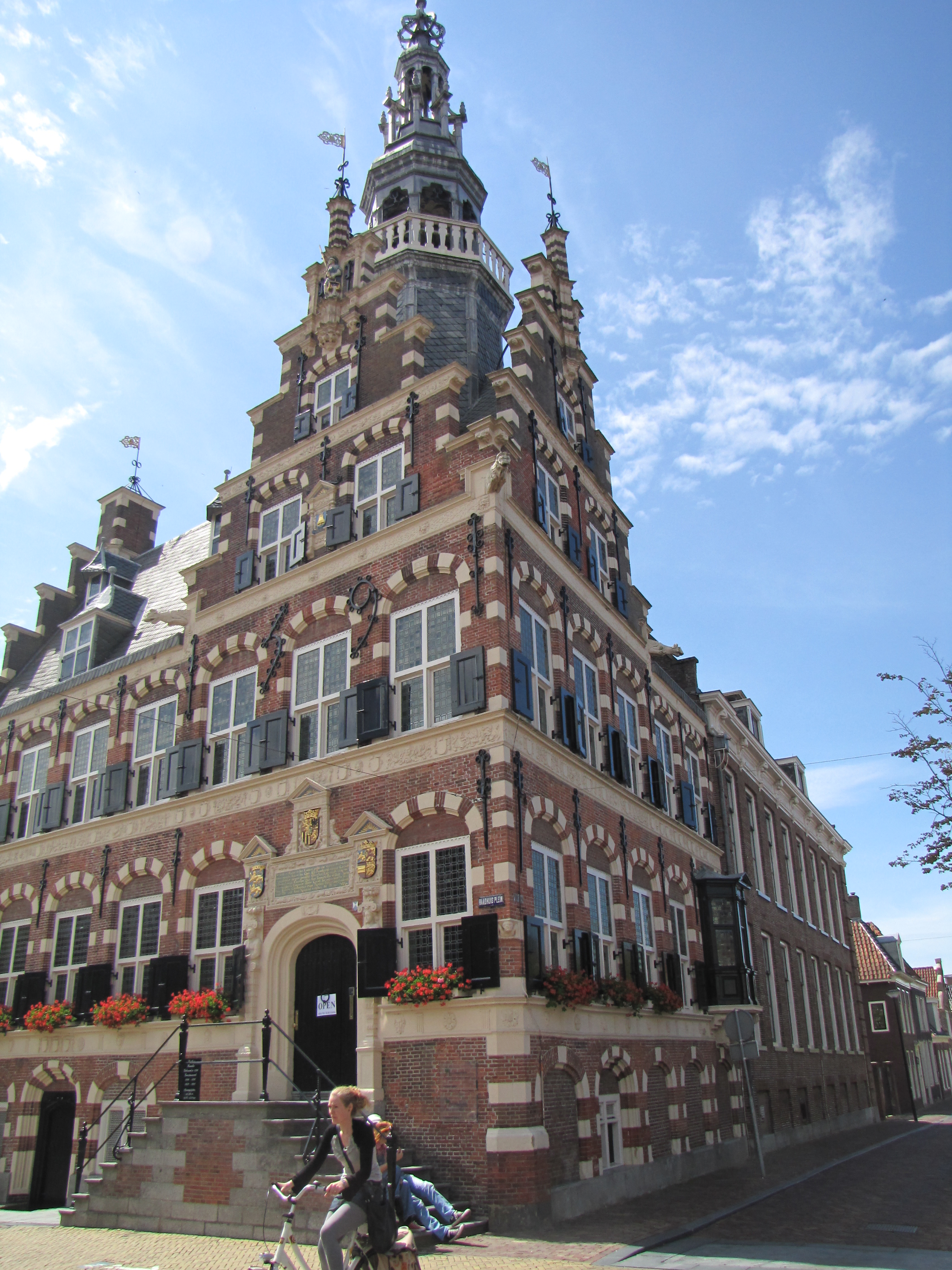 Rathaus Franeker